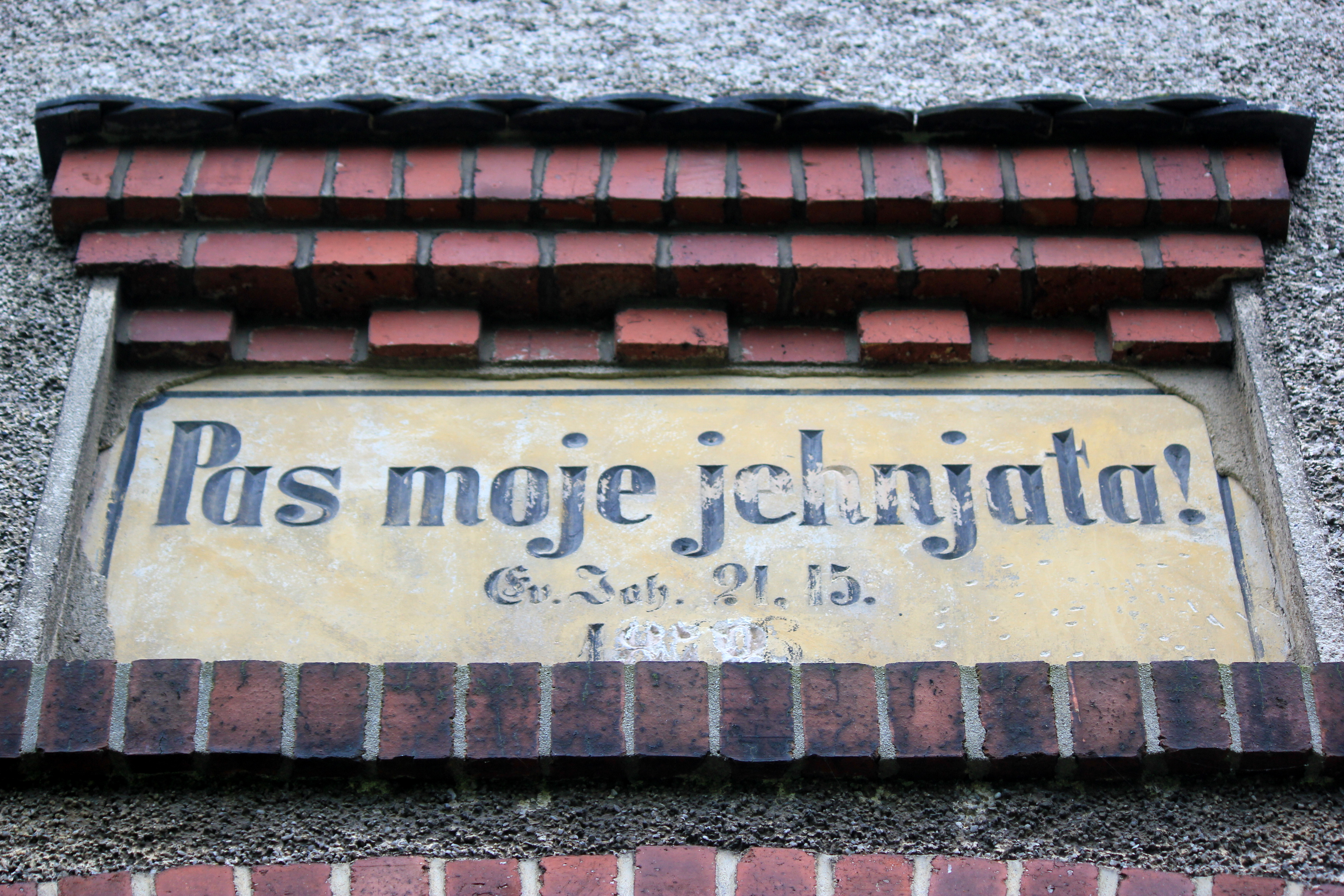 Hornjoserbsce: Serbski napis při starej šuli we Wukrančicach.